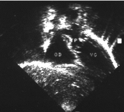 TGV - tronc pulm voie sous costale